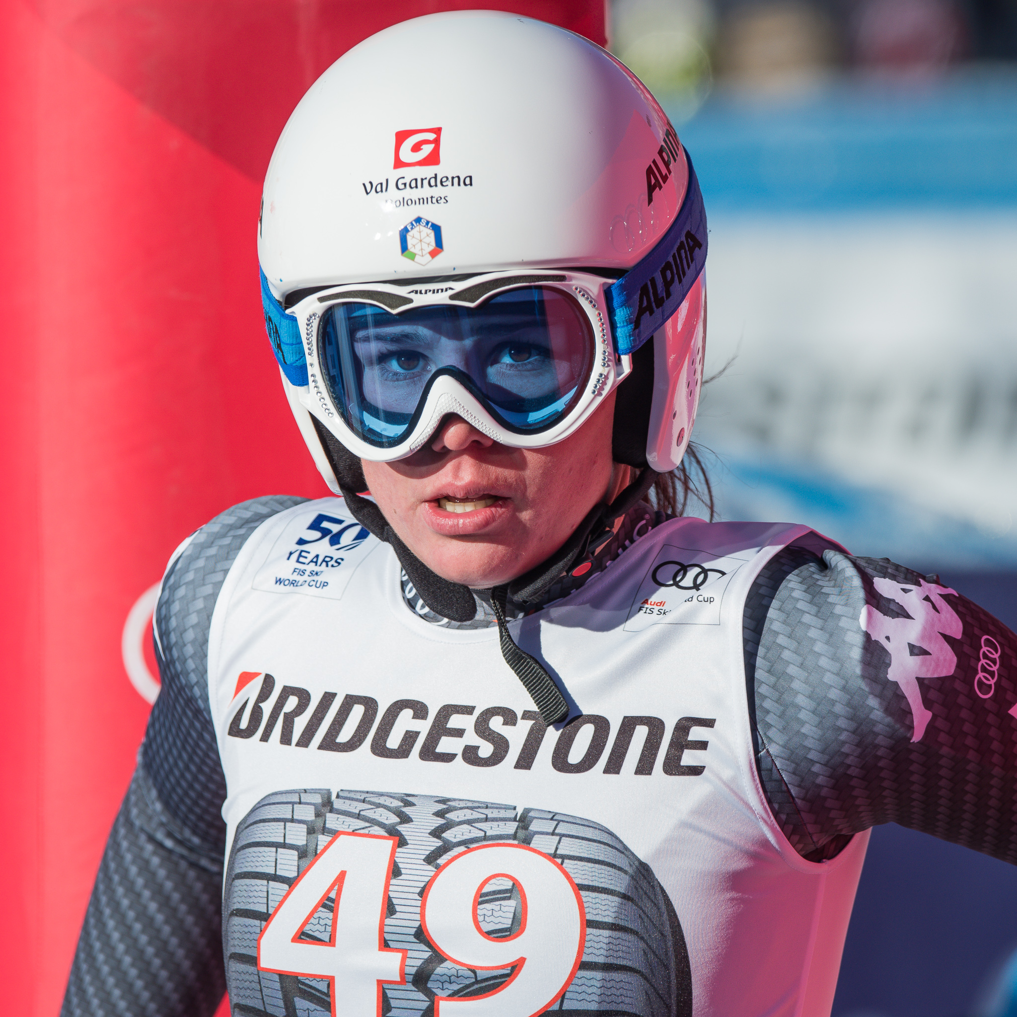 64. Kandahar Rennen,Audi FIS Ski Weltcup Garmisch-Partenkirchen,Damen Super-G,Kandahar,Ladies Super-G,Nicol Delago